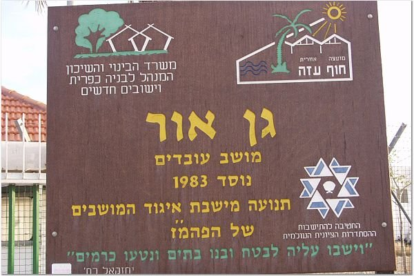 גן אור התמונות באדיבות קטיף.נט (קישור) אתר האינטרנט של גוש קטיף. צילם: מוטי סנדר.